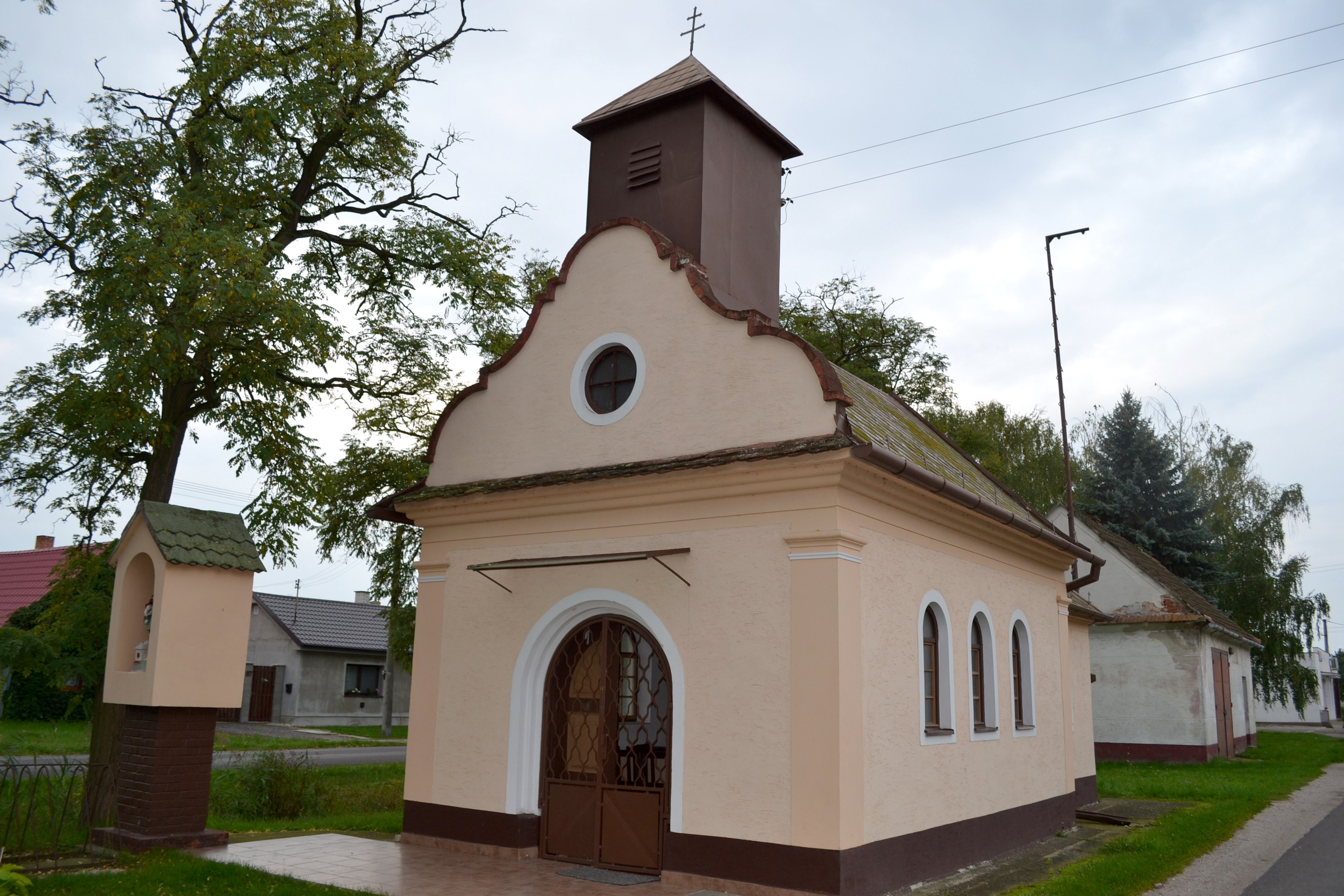 Kuklov (okr. Senica), Kaplnka Sedembolestnej Panny Márie v obci; celkový pohľad